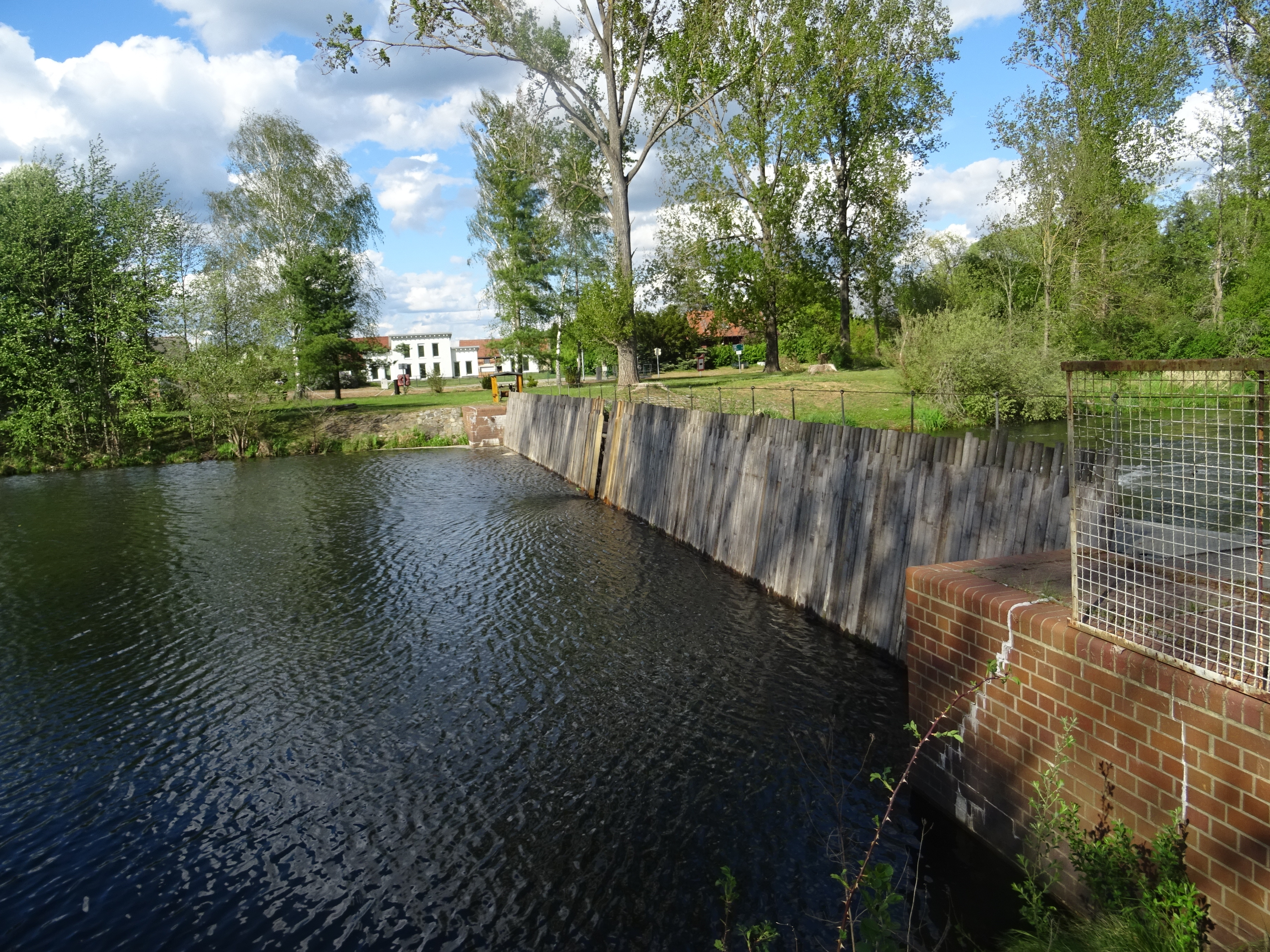 Alt-Schadow, denkmalgeschütztes Nadelwehr an der Spree, Seite flussaufwärts